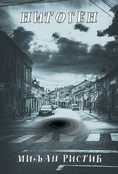 Предња страница књиге Нитоген на којој се налази фотографија главне улице у Неготину. Фотографија је дело Ивана Алаксандровића који је дозволио да се за потребе књиге фотографија модификује додавањем вира на сред улице. Корица је дело аутора књиге.